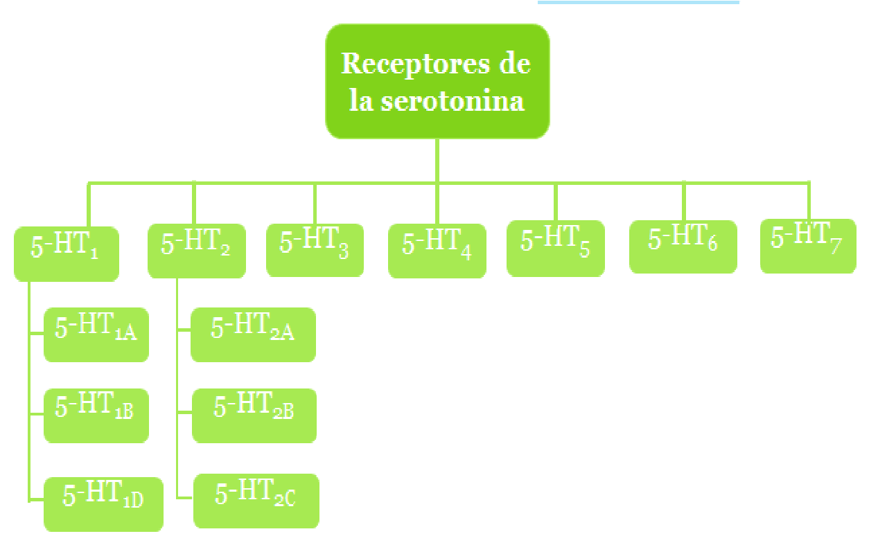 Grupos de receptores de la serotonina.